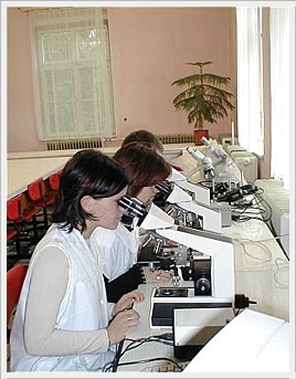 Laborgyakorlat - baktériumok vizsgálata